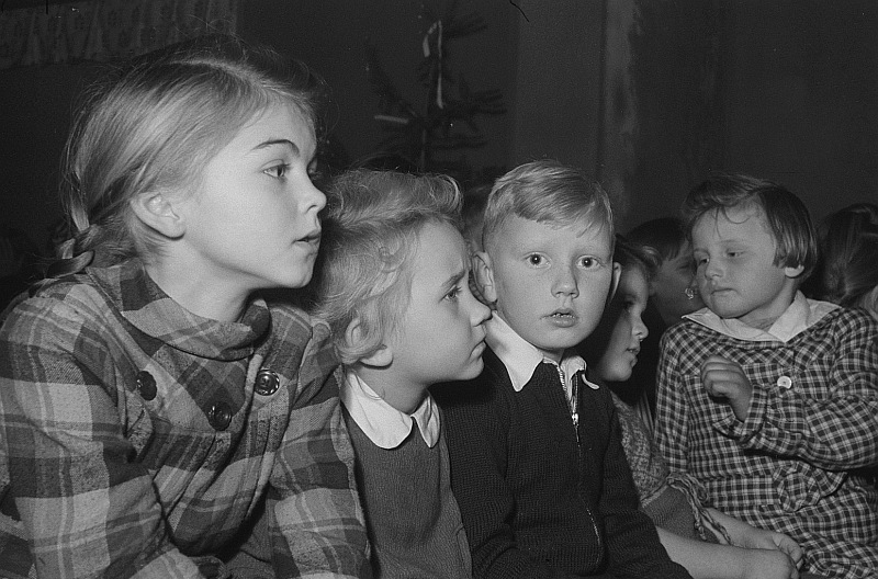 Original image description from the Deutsche Fotothek Kinder vor der Bescherung